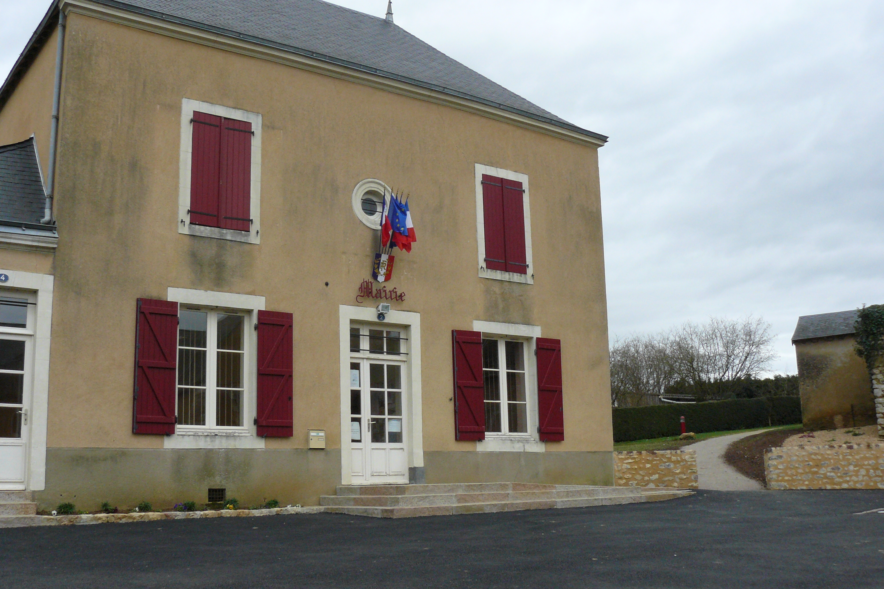 La mairie occupe le rez-de chaussée du bâtiment